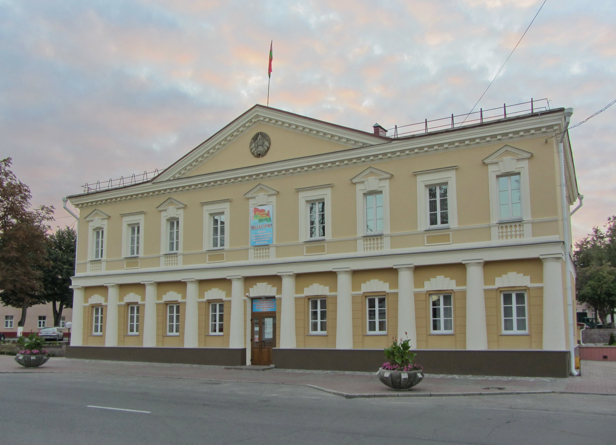 Беларуская (тарашкевіца): Будынак былой расейскай карчмы. г. Гомель This is a photo of Belarusian heritage monument. Reference number: 312Г000009 ( WLM)